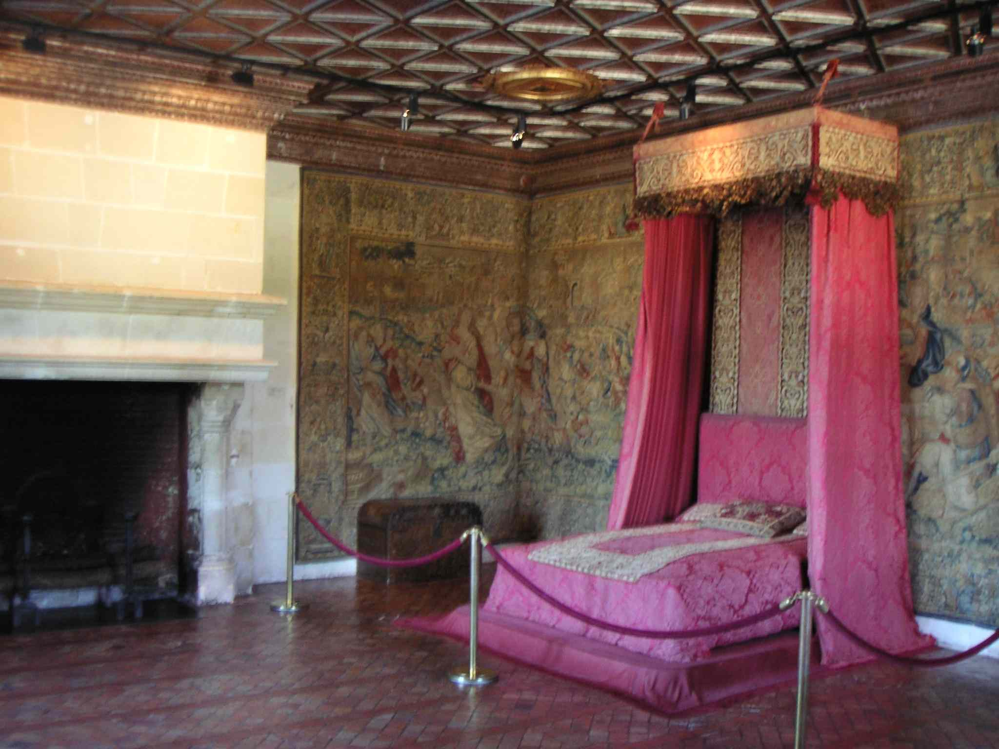 La chambre des cinq Reines au château de Chenonceau (France) septembre 2005